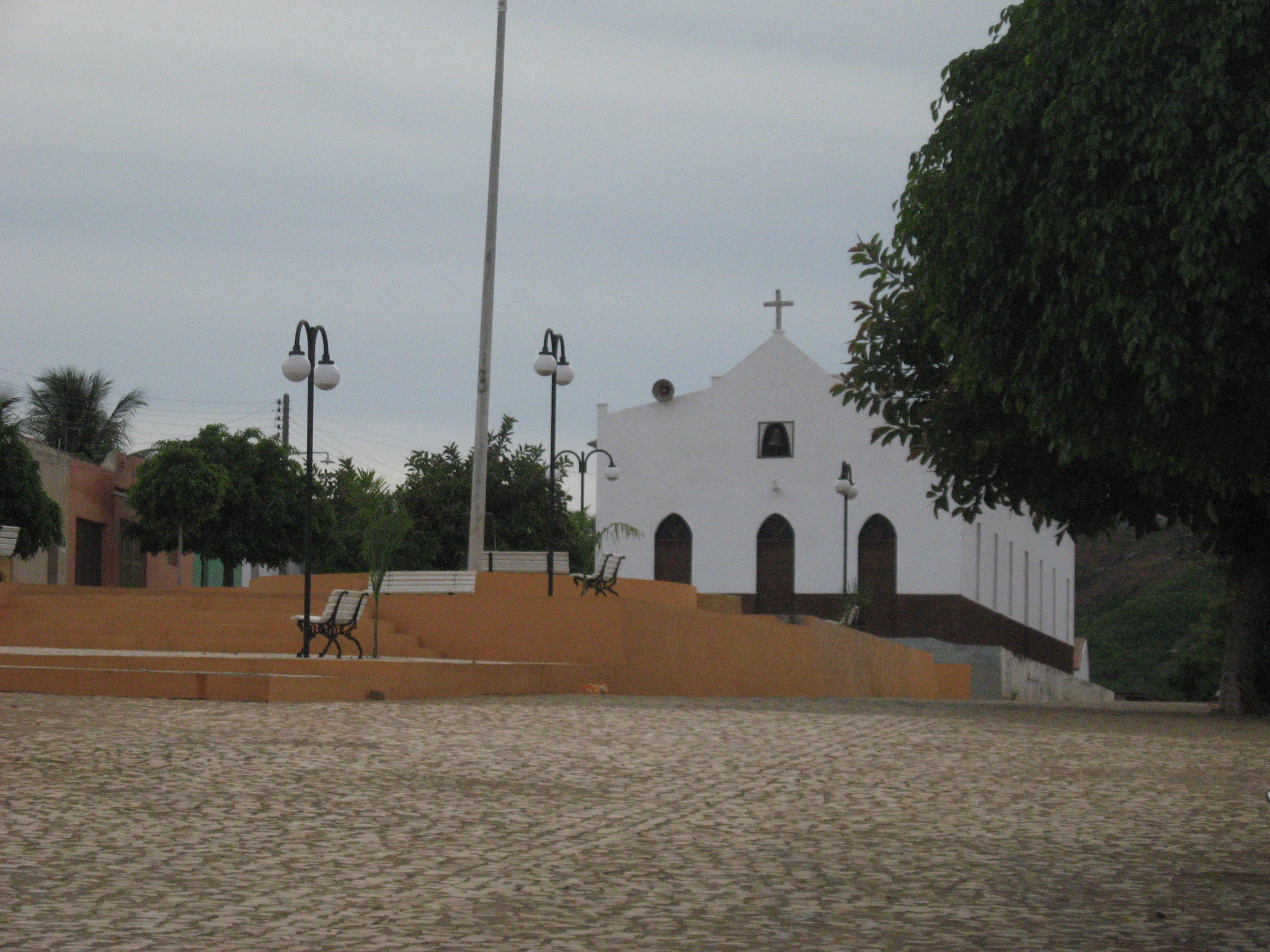 Praça e Igreja do Distrito Quixaba